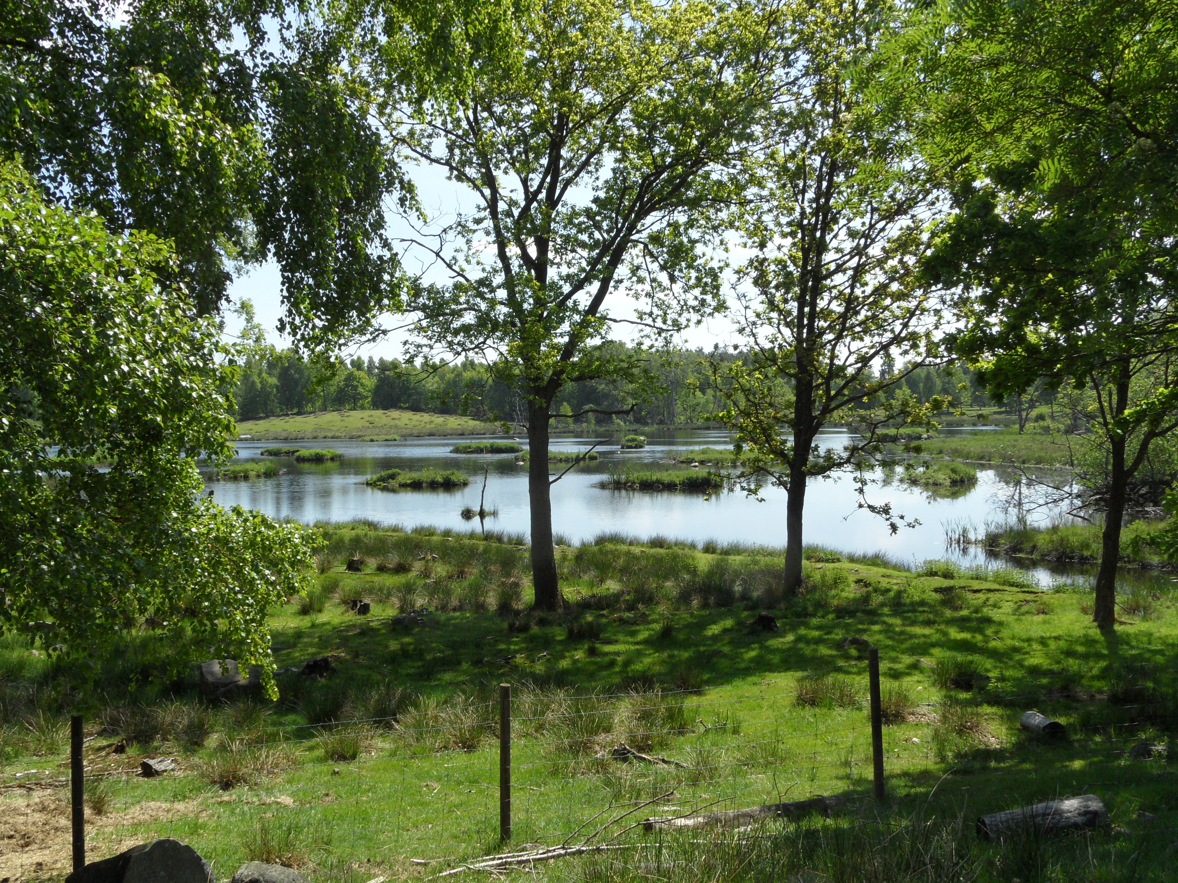 Naturreservatet Fjällmossen; Viggarum en sommardag